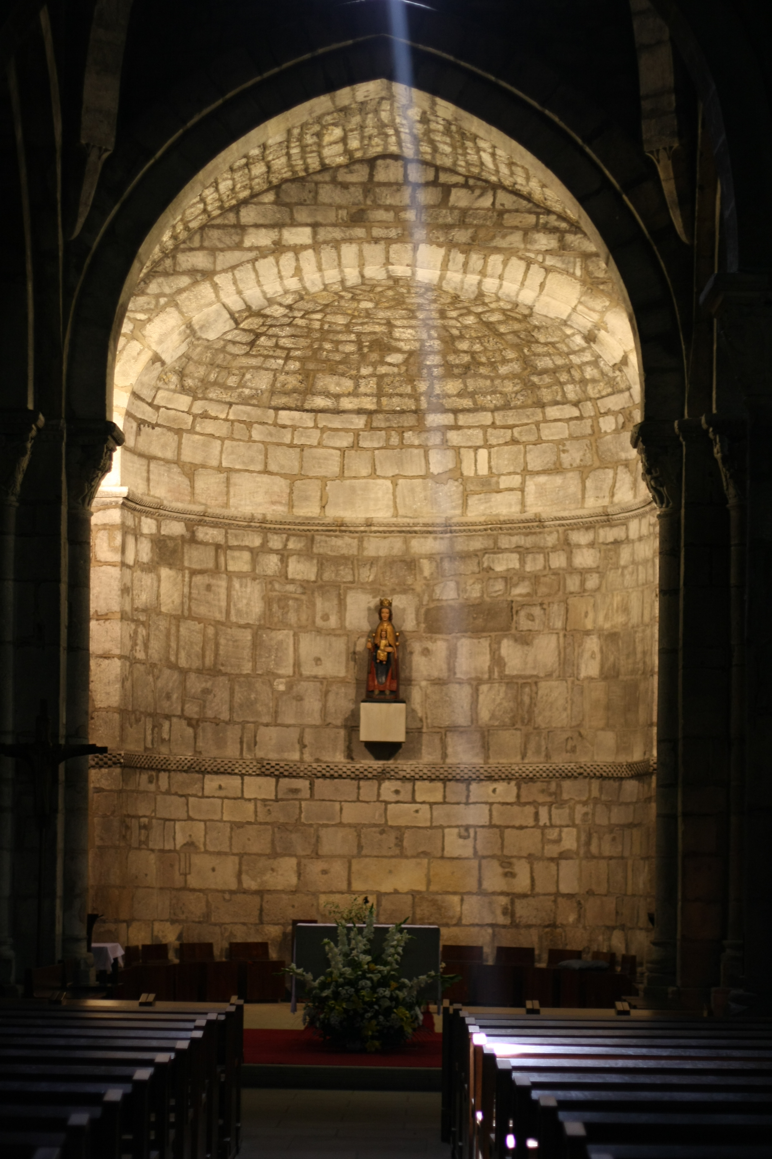 Romanische Klosterkirche Nuestra Señora de Estíbaliz, Apsis mit Marienfigur aus dem 12. Jahrhundert